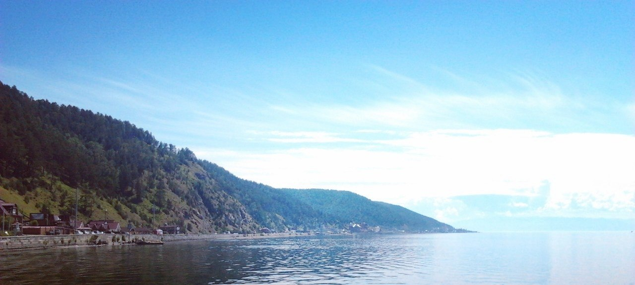 Листвянка, Иркутский район This image is related to the protected area of Russia number 3810100